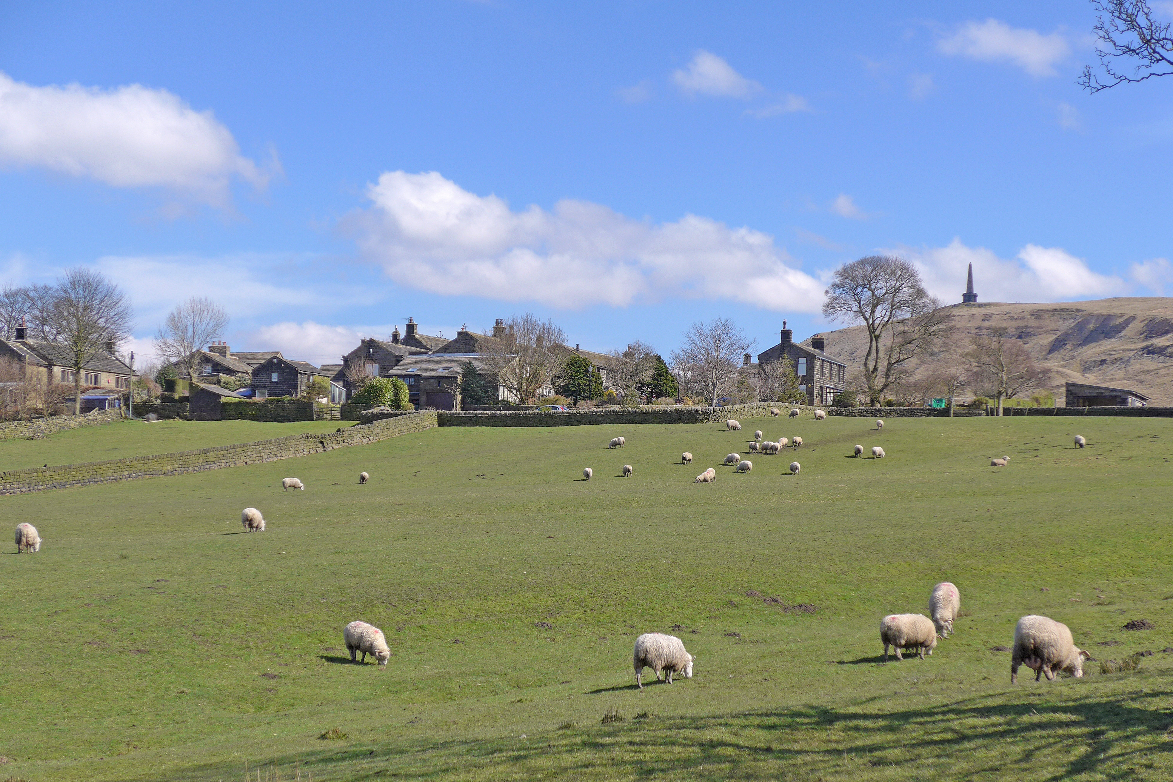 Mankinholes